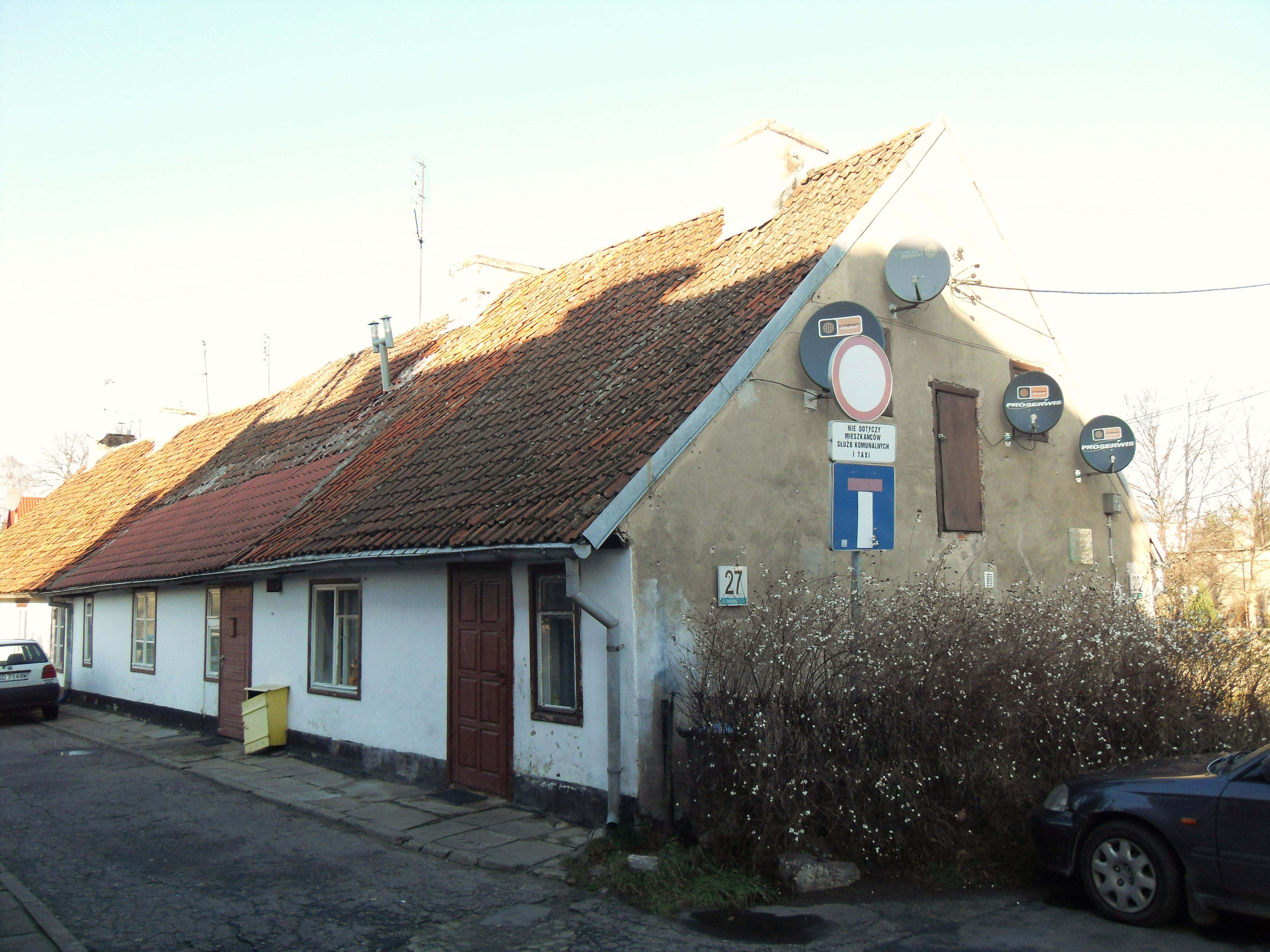 Gdańsk Jelitkowo ul. Bałtycka 27, jeden z budynków zespołu domów rybackich.